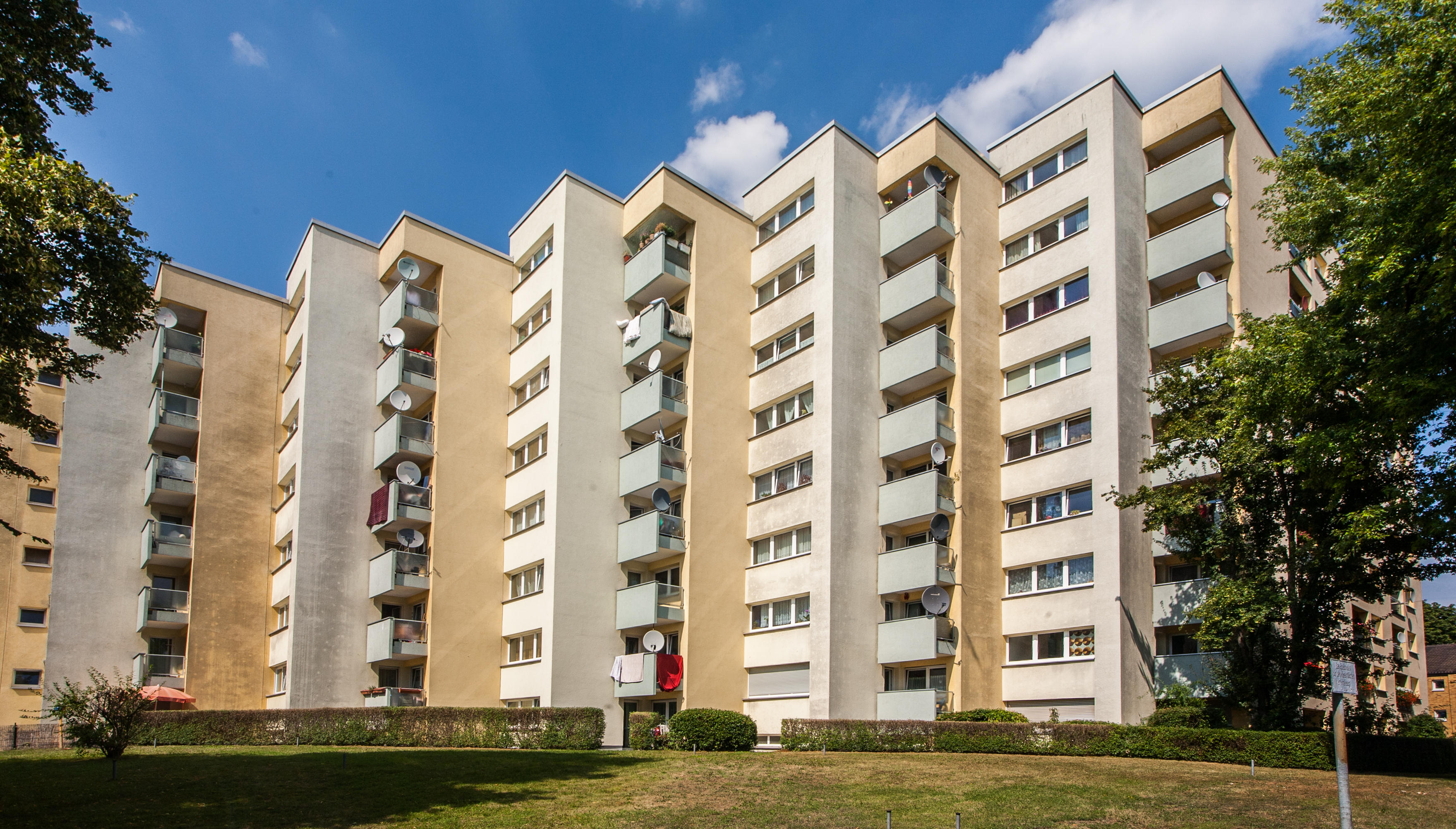 Wohnpark Neuer Lindenhof, Am Neuen Lindenhof, Bonn: Ansicht aus Süden